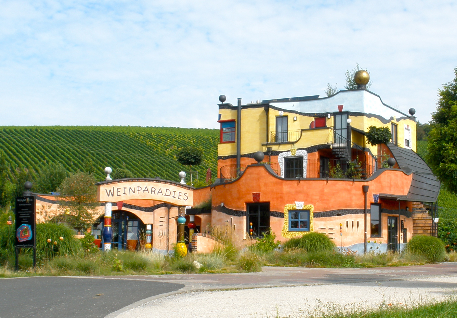 In Untereisenheim (Markt Eisenheim) in Unterfranken, unweit der Mainschleife, befindet sich das Weingut Hirn, architektonisch gestaltet nach Plänen des Künstlers Friedensreich Hundertwasser.